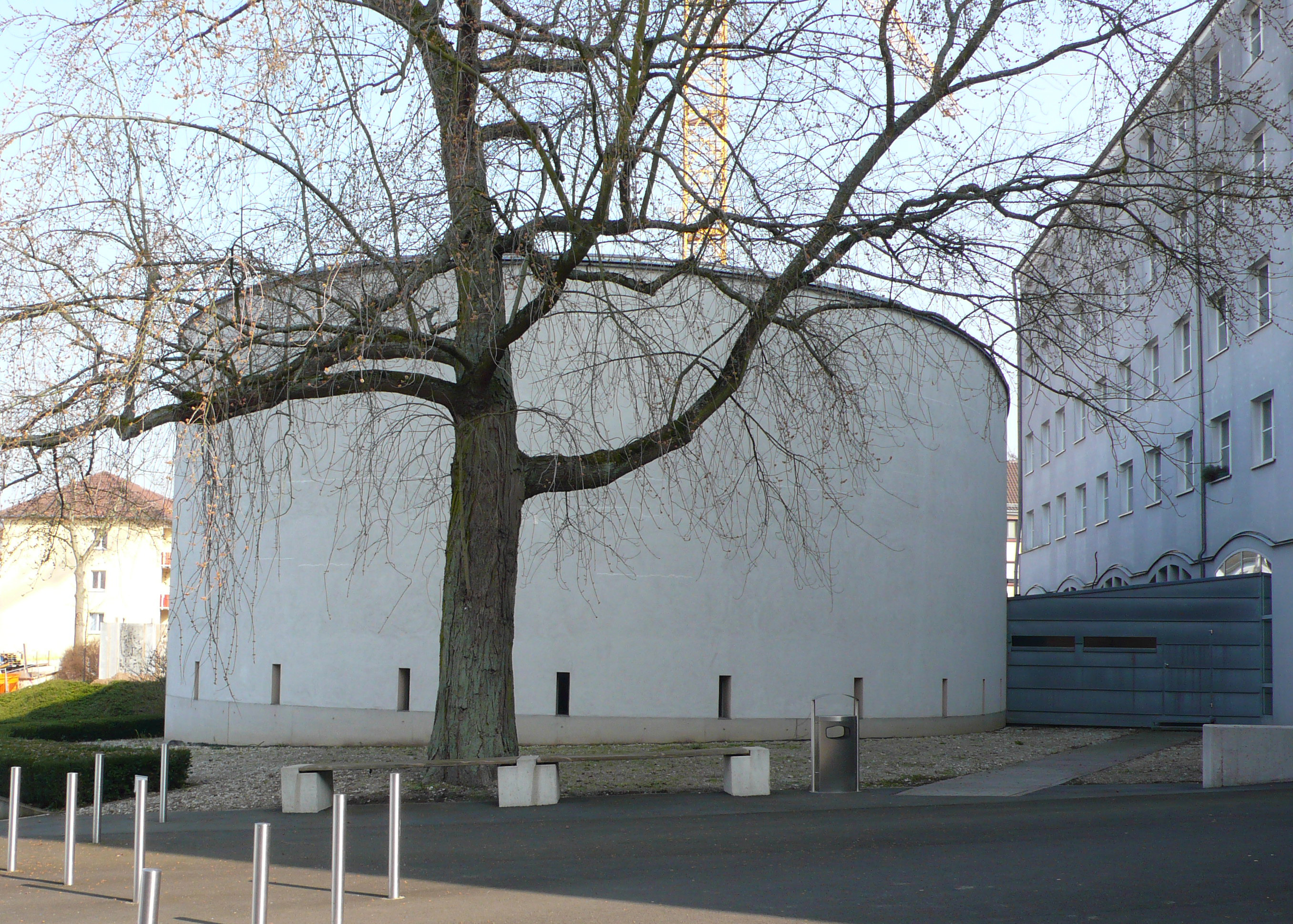 Katholische Seminarkirche der Philosophisch-Theologischen-Hochschule Sankt Georgen in Frankfurt-Sachsenhausen, Offenbacher Landstraße 224; Baujahr 1993; Architekt: Ernst Studer